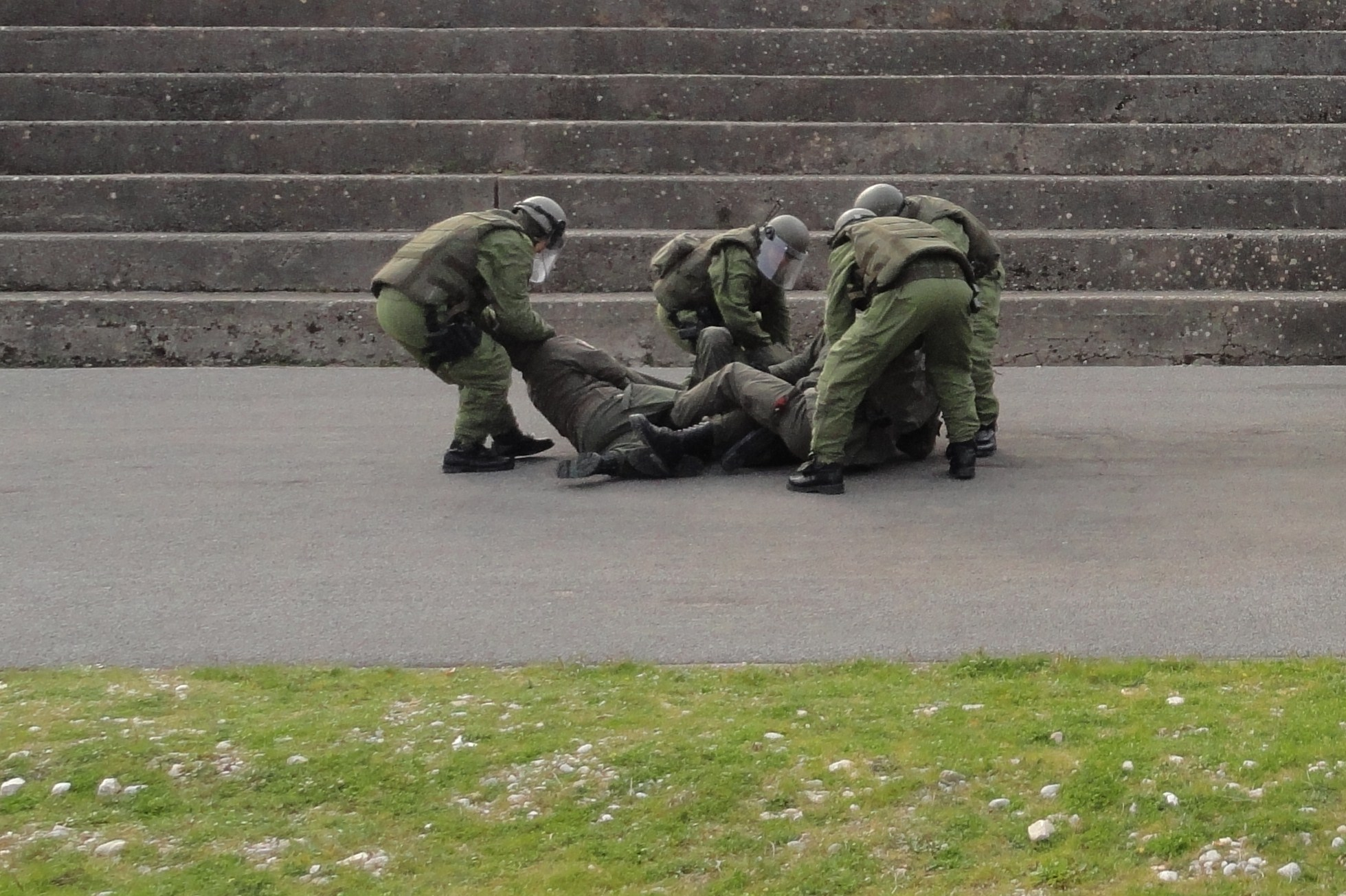 Sit-in training for EUFOR, Austrian Army (Bundesheer)